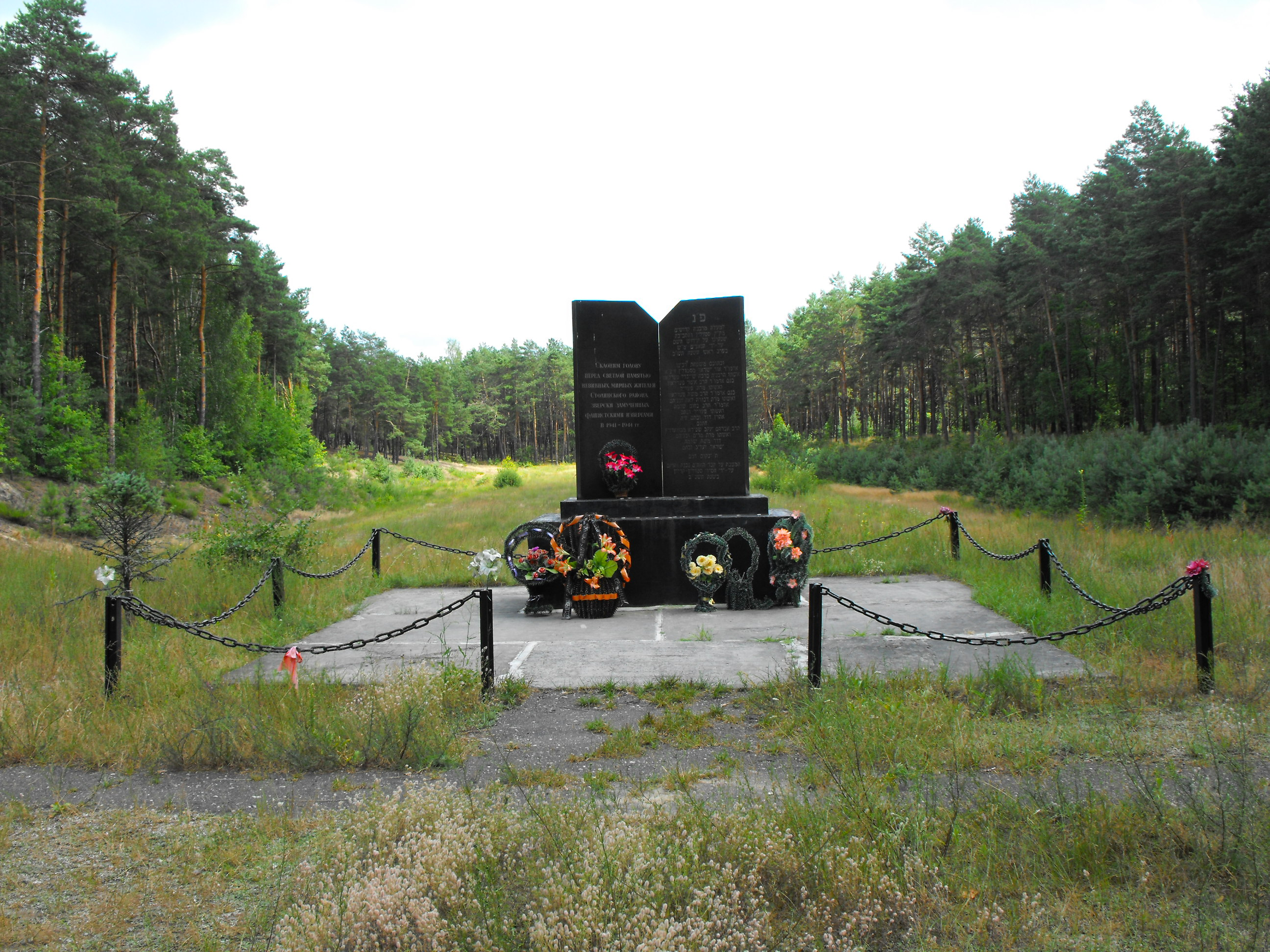 Памятники на месте массовых убийств 12 500 человек - среди них 8 000 евреев Столинского гетто, города Столина и близлежащих деревень, убитых в сентябре 1942 года. Находятся в урочище Стасино (Долин) в 5 километрах севернее Столина. В октябре 1993 года по заказу Киевской еврейской общины был открыт мемориал, один из монументов которого выполнен в виде раскрытой книги. Второй памятник по заказу Столинского горисполкома выполнен в виде женщины с ребенком. На этом месте в Стасино накануне Второй мировой войны началось строительство аэродрома - успели вырубить лес и выкопать котлован для подземных ангаров. Эти незавершенные котлованы и были использованы нацистами и полицаями как расстрельные ямы.